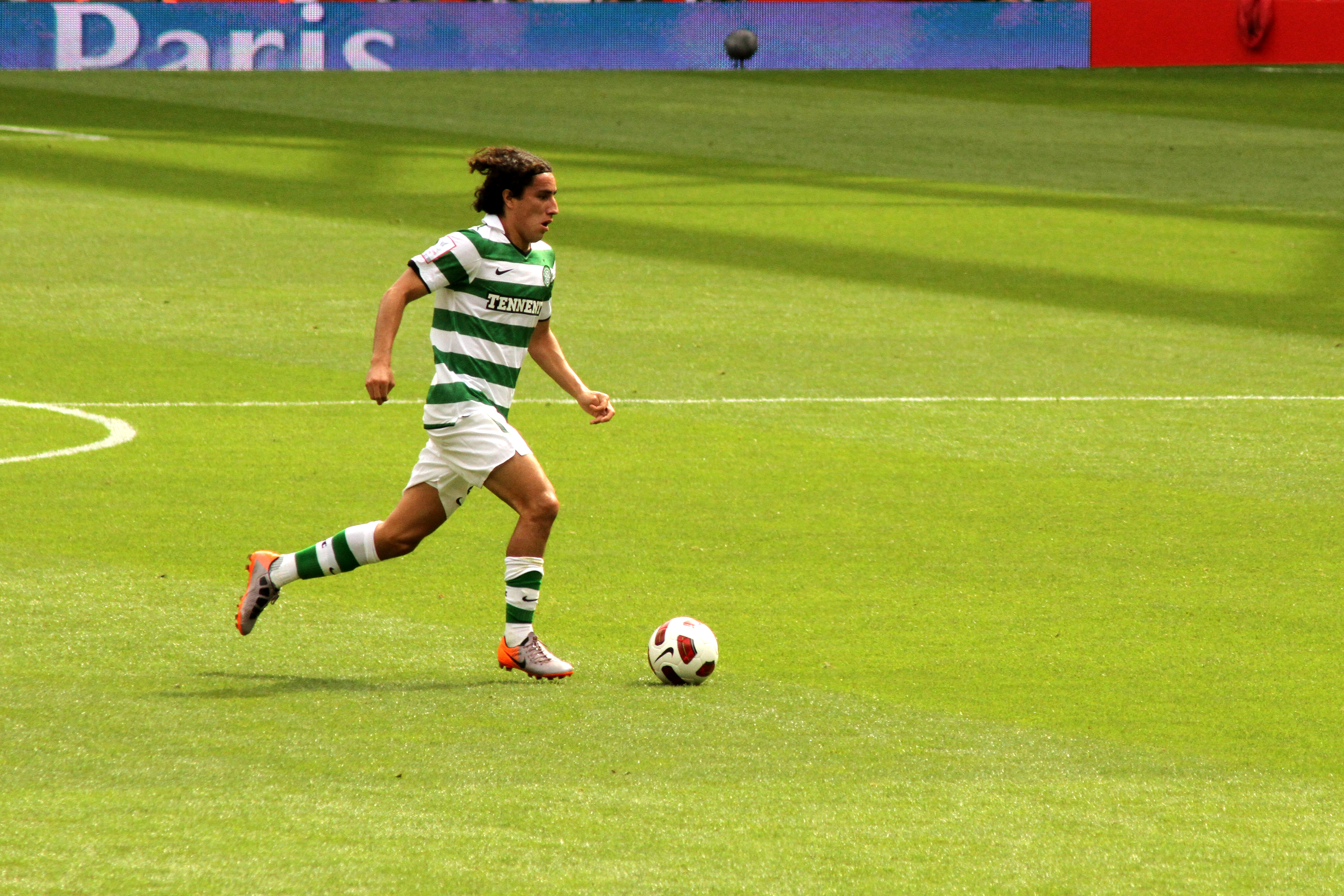 Efrain Juarez